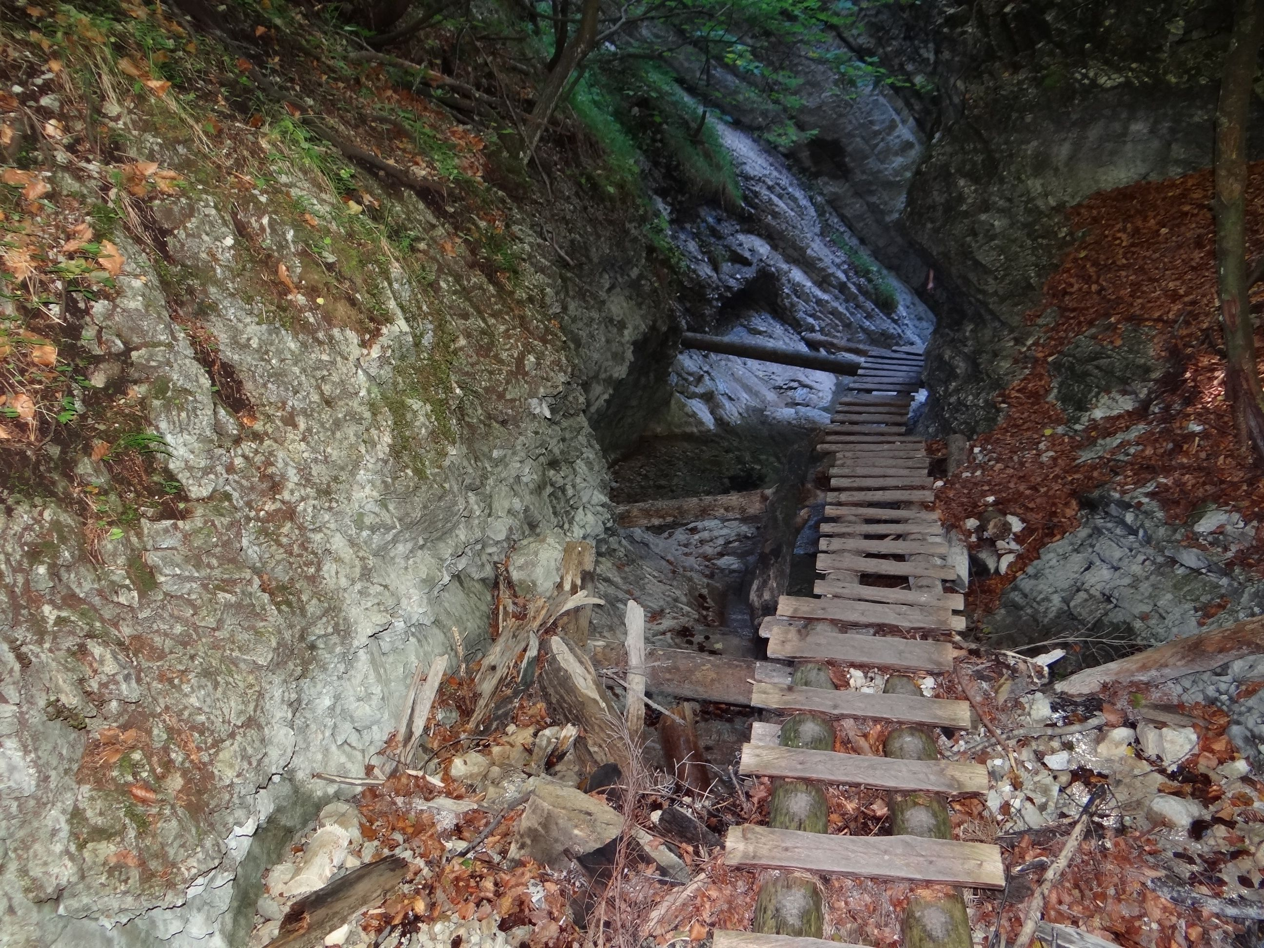 Piecky